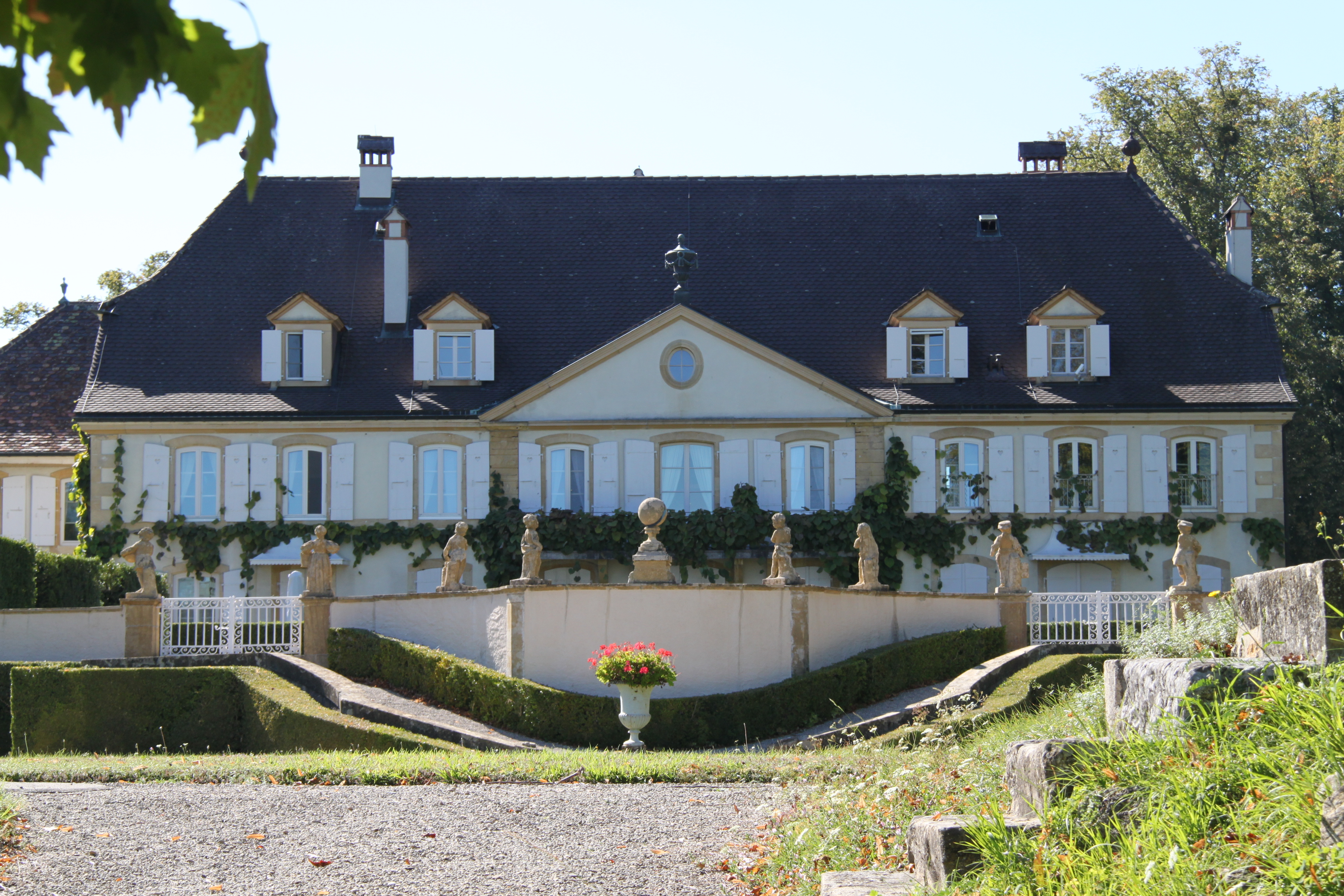 Maison de maître du Bied sur la commune de Colombier.